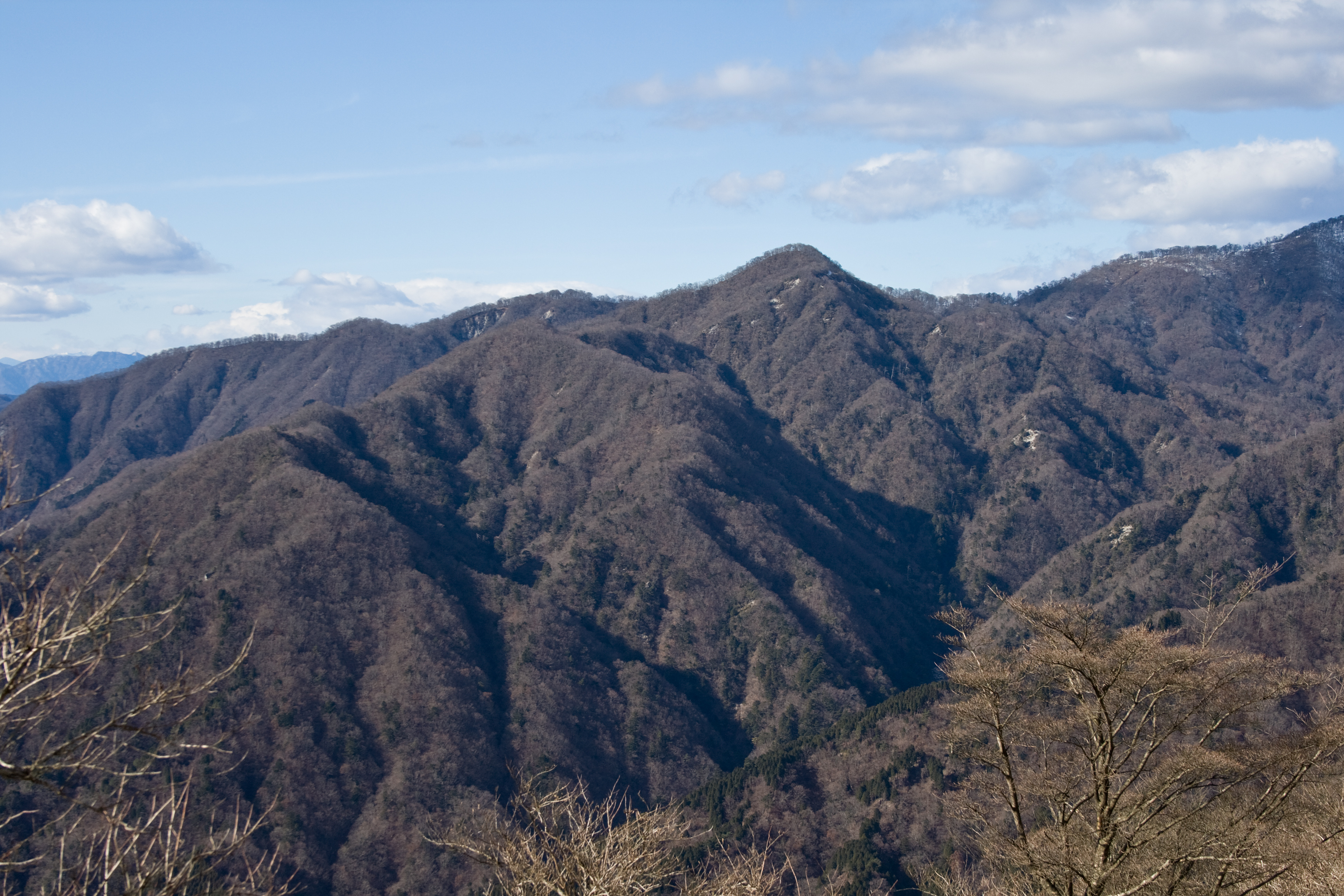 鍋割山より望む同角ノ頭